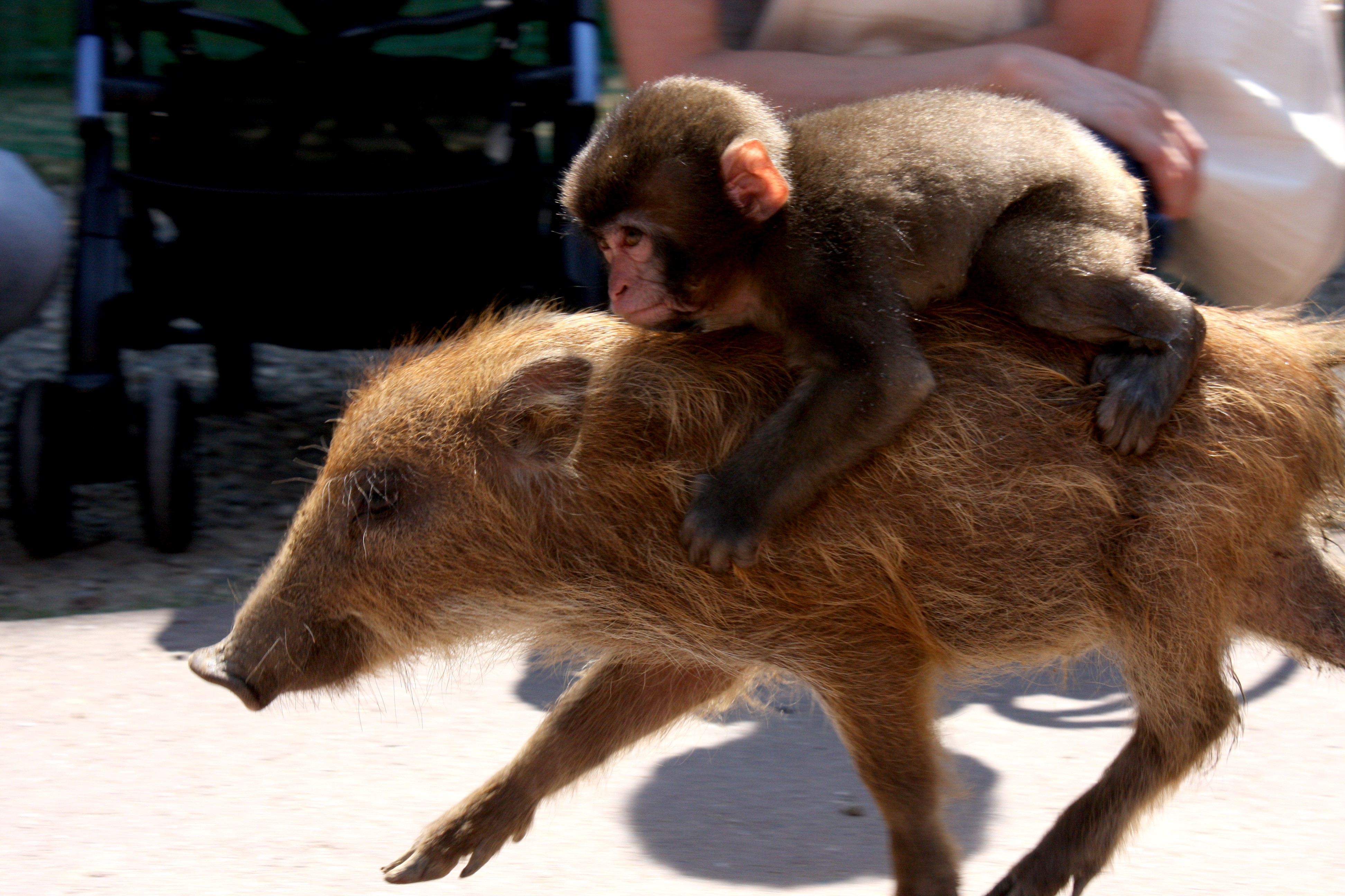 Macaca fuscata & Sus scrofa （miwa&uribo)